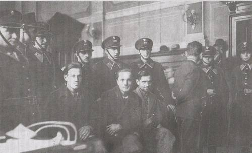 Судовий процес Біласа та Данилишина